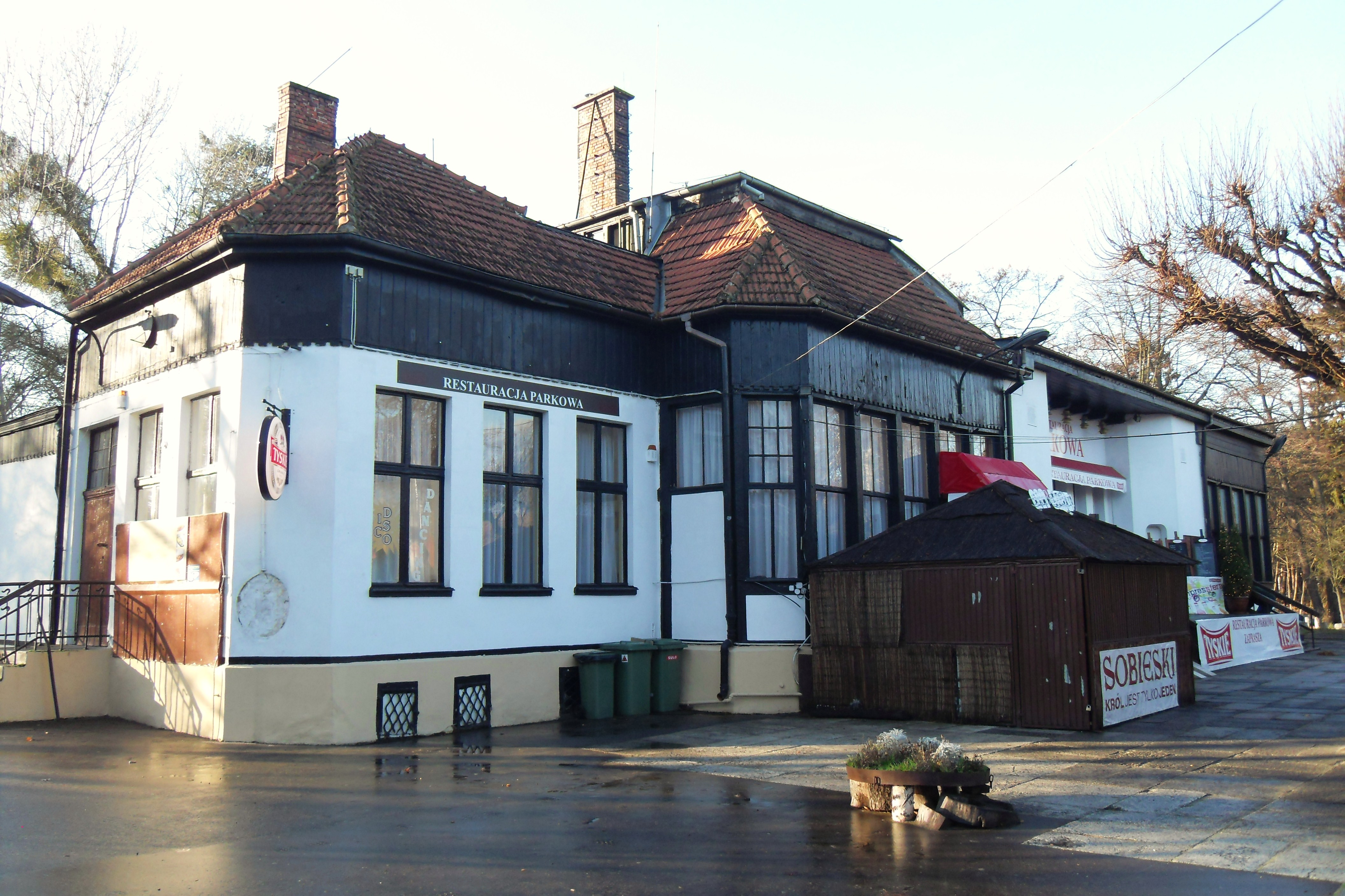 Gdańsk Jelitkowo, dawny dom zdrojowy. Obecnie restauracja "Parkowa", ul. Pomorska 57a.